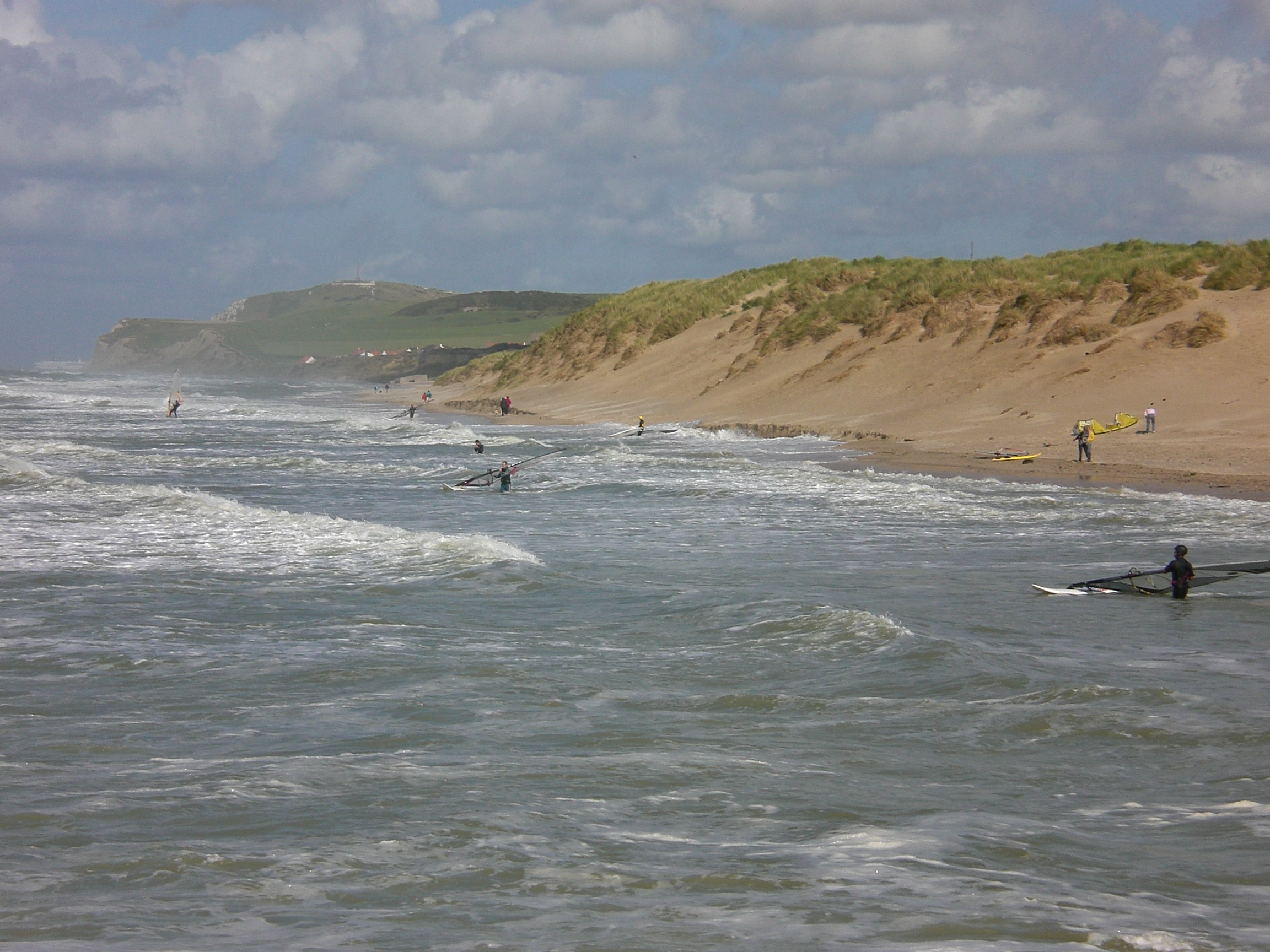 Littoral de Wissant très prisé par les planchistes à voile, les surfeurs, les skysurfers... On distingue au loin le Cap Blanc-Nez.